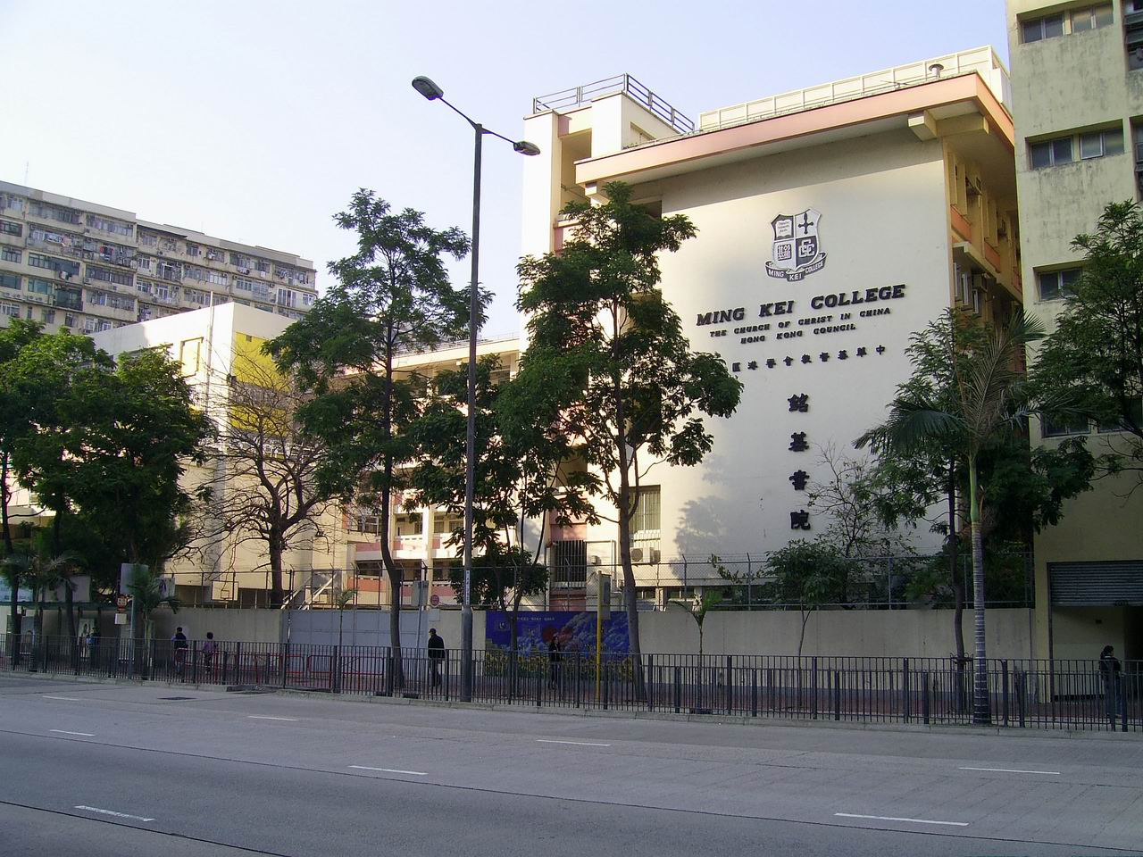 中文（香港）: 中華基督教會銘基書院